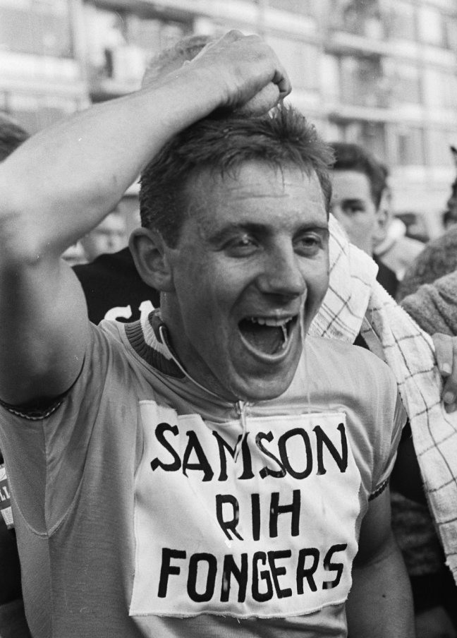 Olympias Toer Henk Cornelisse gaat als eerste over de finish te Vlaardingen, Henk Cornelisse knijpt spons over zijn hoofd uit